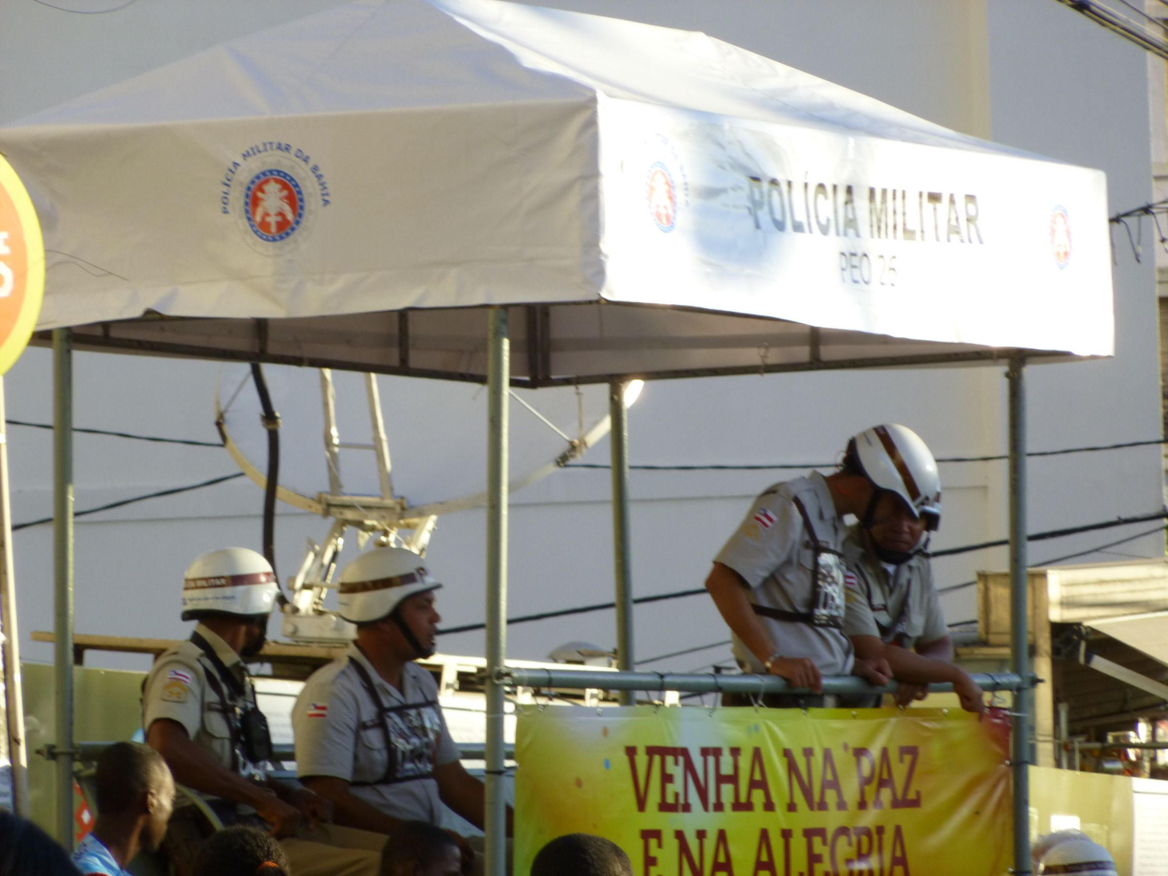 Militärpolizei beim Karneval in Salvador 2013